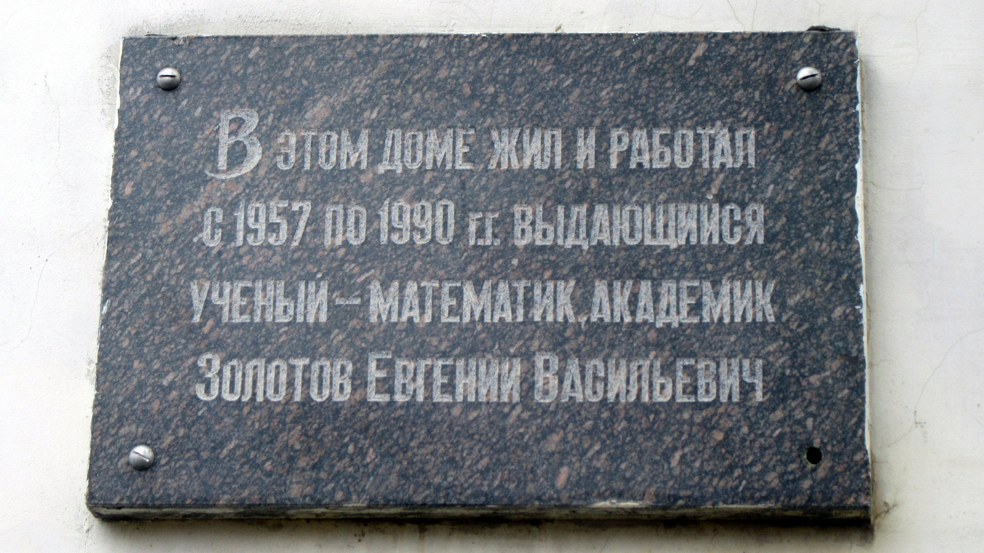 Золотов Евгений Васильевич (1922-1990) - математик, доктор технических наук, академик АН СССР